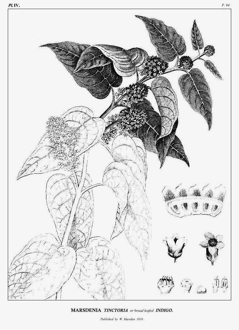 Marsdenia Tinctoria